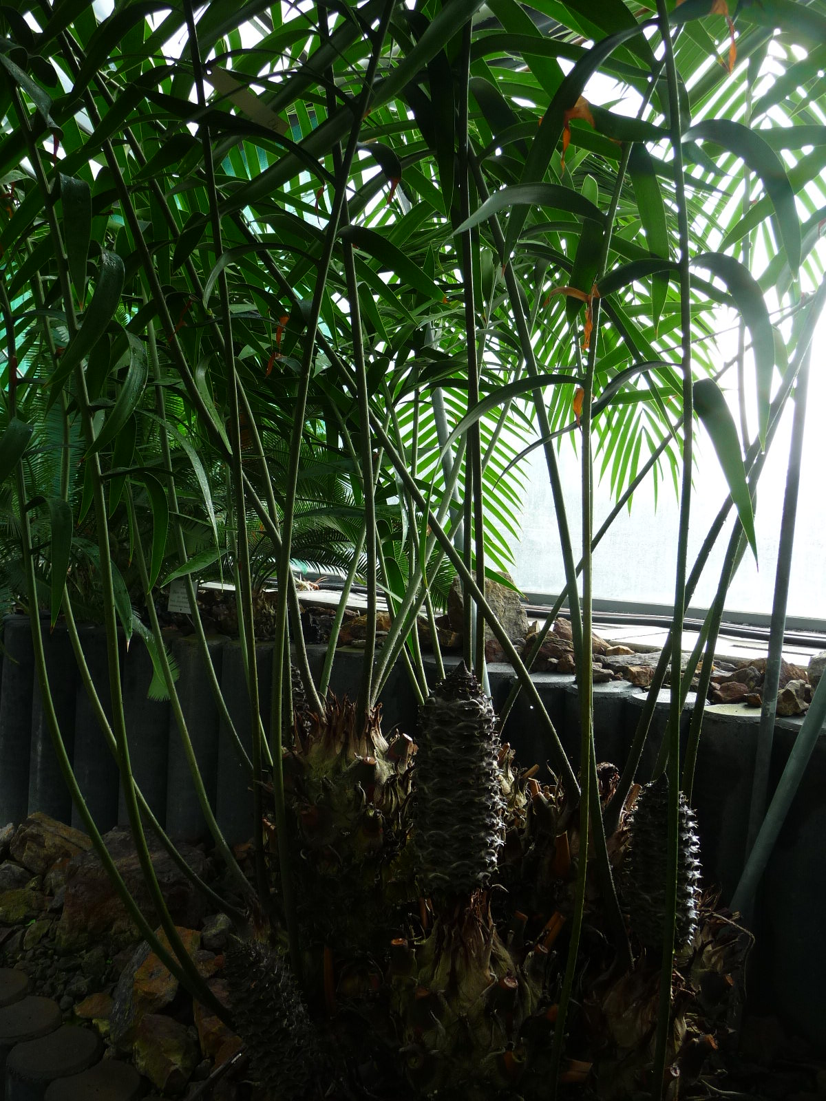 Ceratozamia miqueliana (Hamburgi pálmaház)